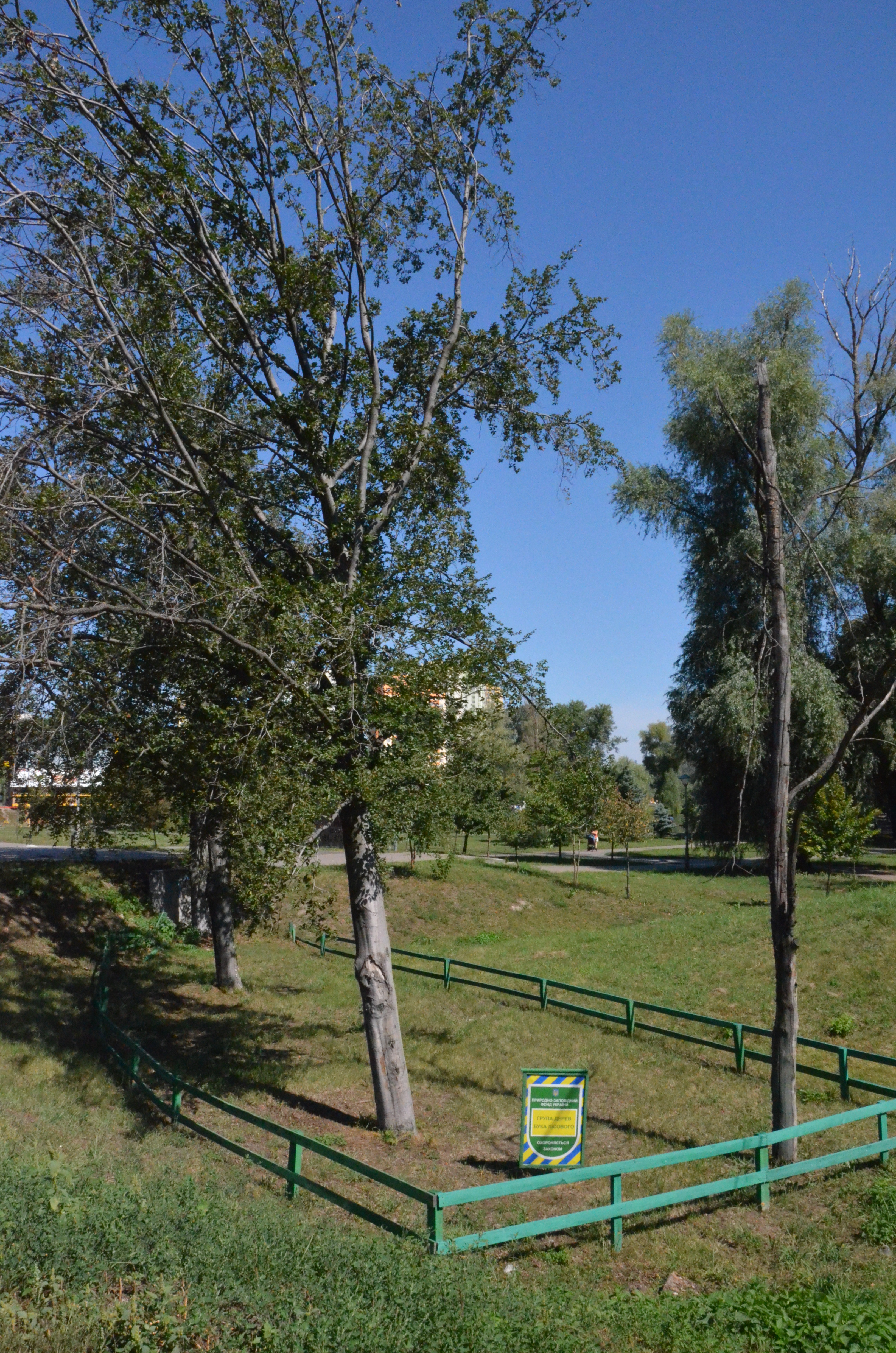 Група дерев бука лісового, Дніпровський район парк «Перемога»